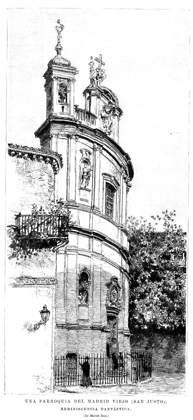 Una parroquia del Madrid viejo, San Justo, en la revista La Ilustración Española y Americana.